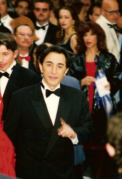 Richard Berry (et Jacques Gamblin, coupé à gauche) au festival de Cannes